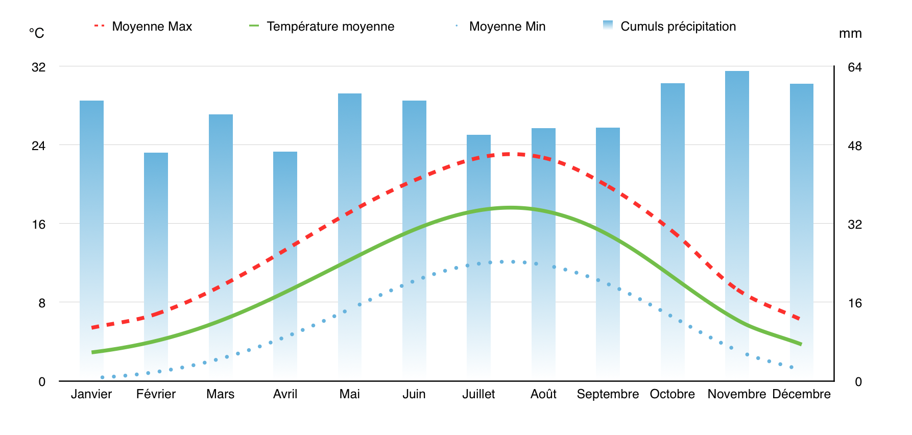 Diagramme montrant l'évolution des moyennes basses hautes et globales des températures a Amiens, ainsi que les hauteurs de précipitations. Moyennes calculées a partir des 15 dernières années de relevées de la station de Beauvais et Albert (données disponibles sur le site "infoclimat"